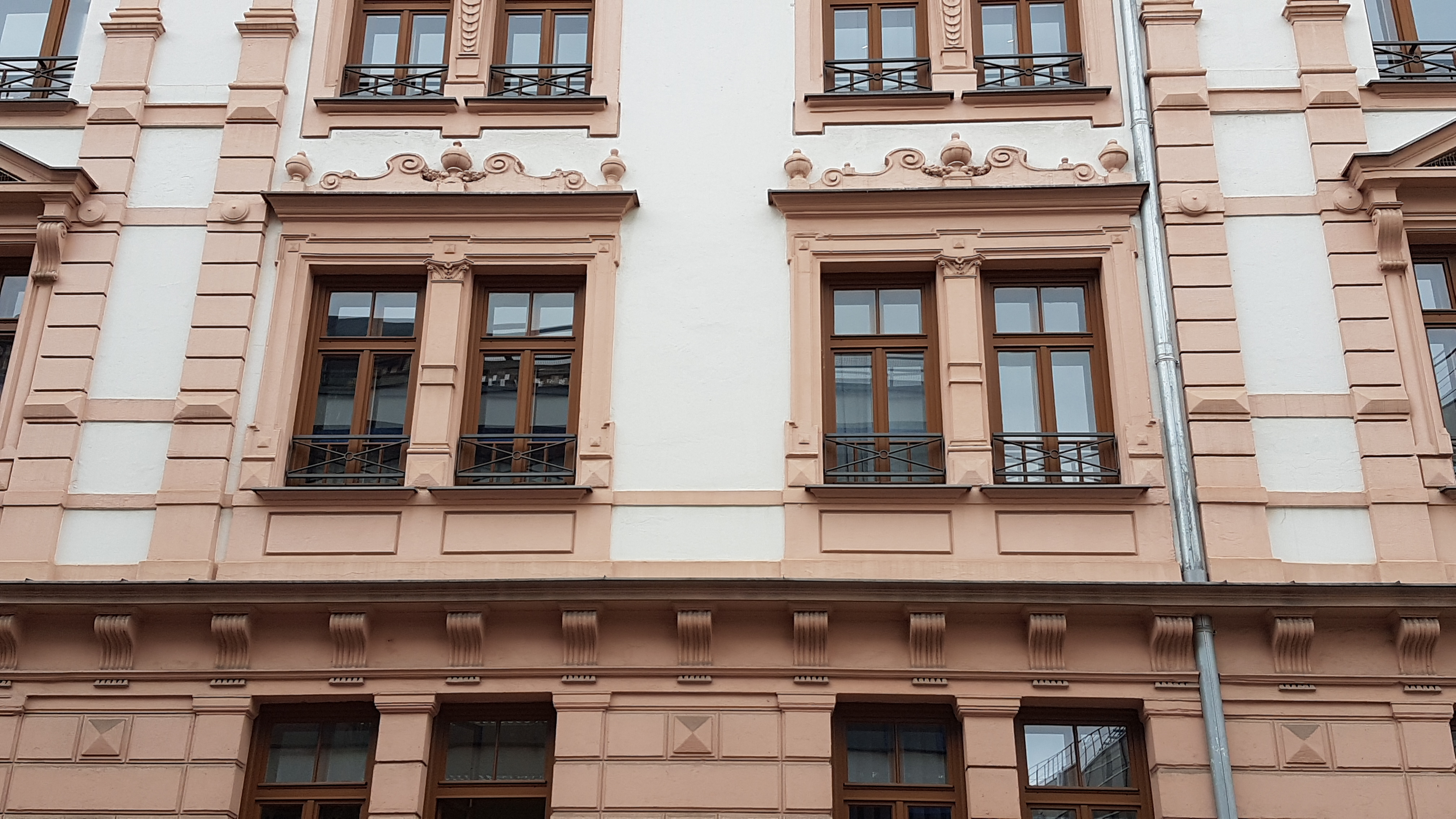 München-Ludwigsvorstadt, Zweigstrasse 10, ehemaliges Hotel Kronprinz.